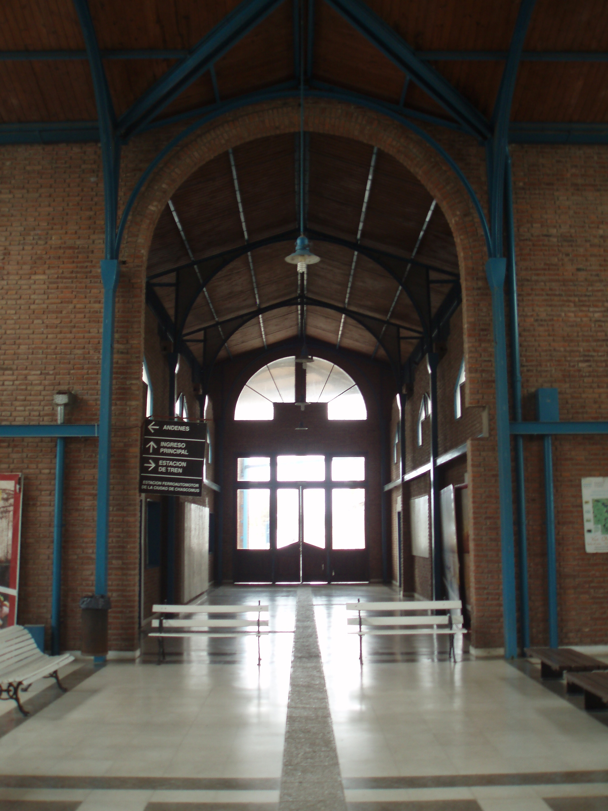 Terminal de Omnibus de Chascomus, Argentina.